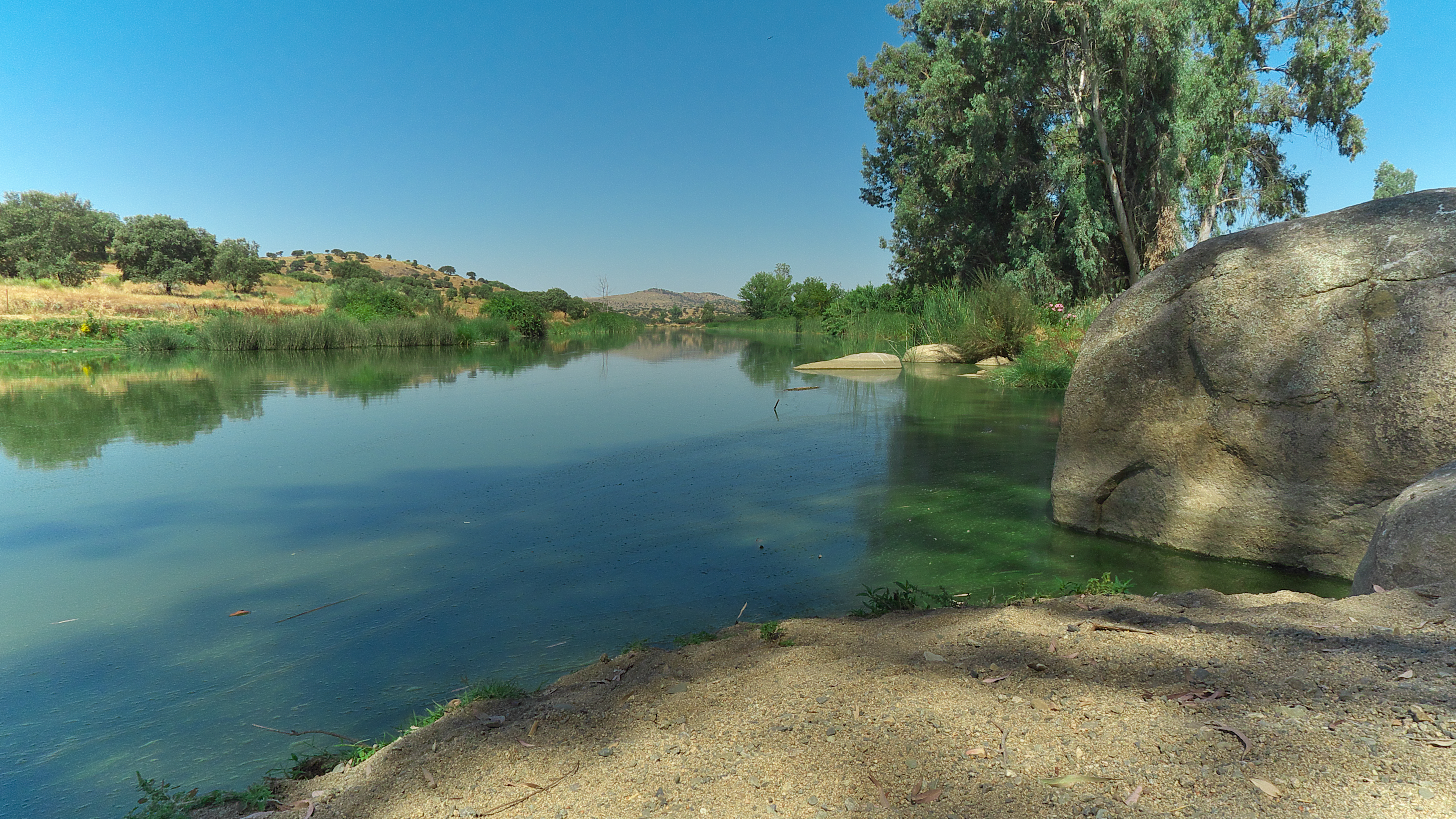 El Río Ardila a su paso por Valencia del Ventoso